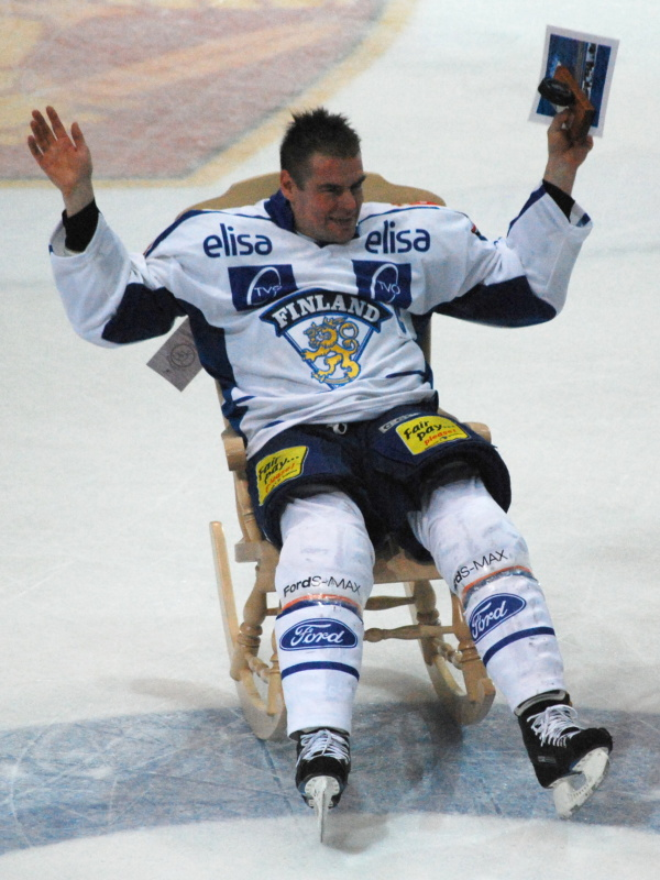 Raimo Helminen retired. Tampere.